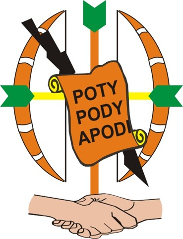 Brasão de Apodi, Rio Grande do Norte, Brasil.